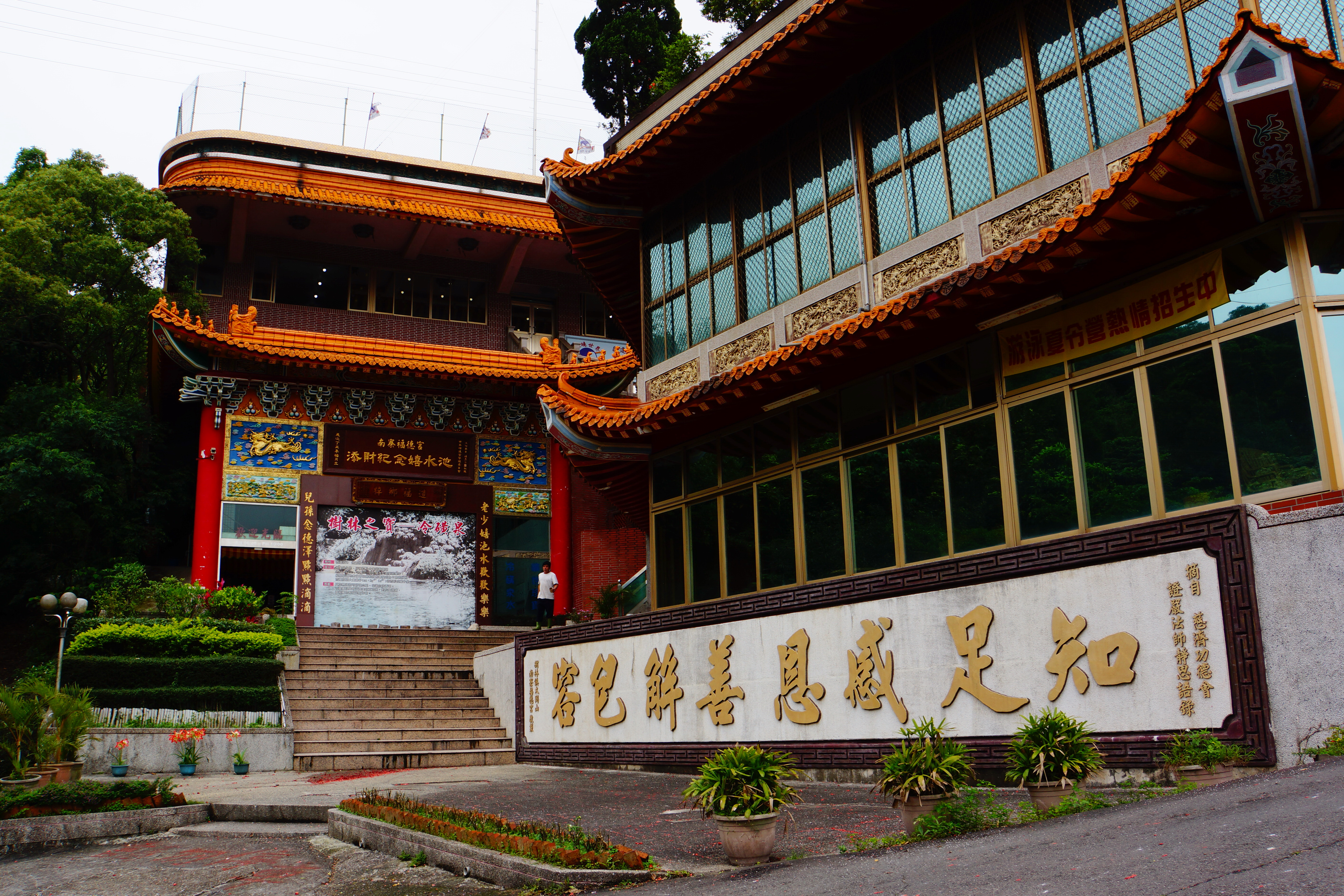 南寮福德宮 Nanliao Fude Temple